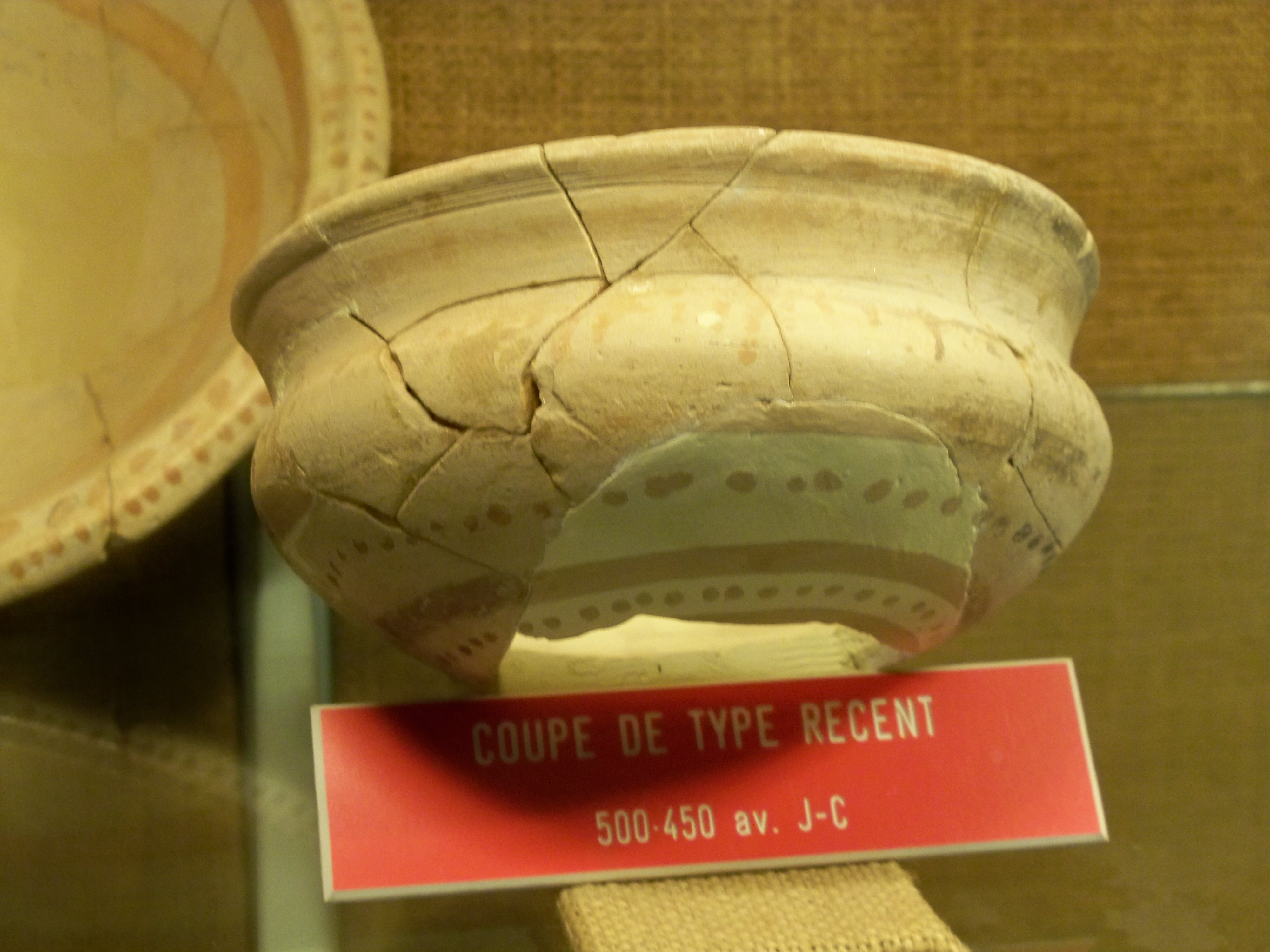 coupe à vin, époque -500 à -450 avant JC